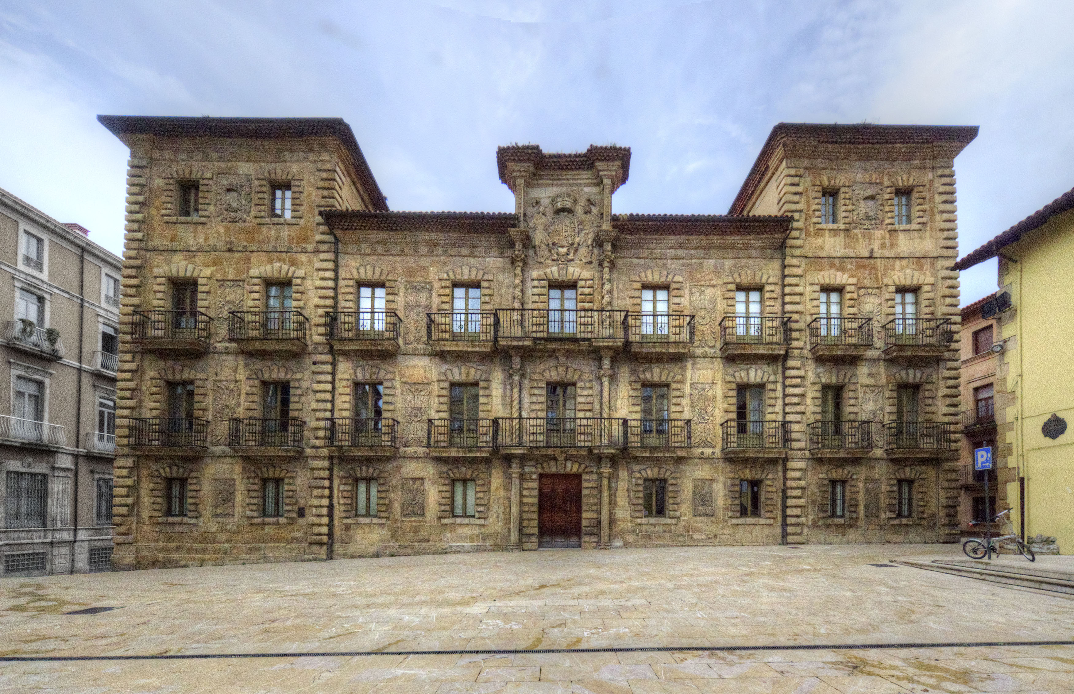 El Palacio de Camposagrado es un edificio de estilo barroco construido en el siglo XVII sobre otro anterior. Hoy alberga la Escuela Superior de Arte del Principado de Asturias. Está en la plaza del mismo nombre en Avilés, Asturias.